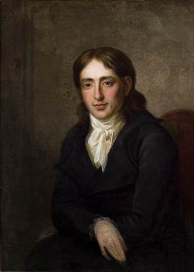 Friedrich Heinrich Wilhelm Körte